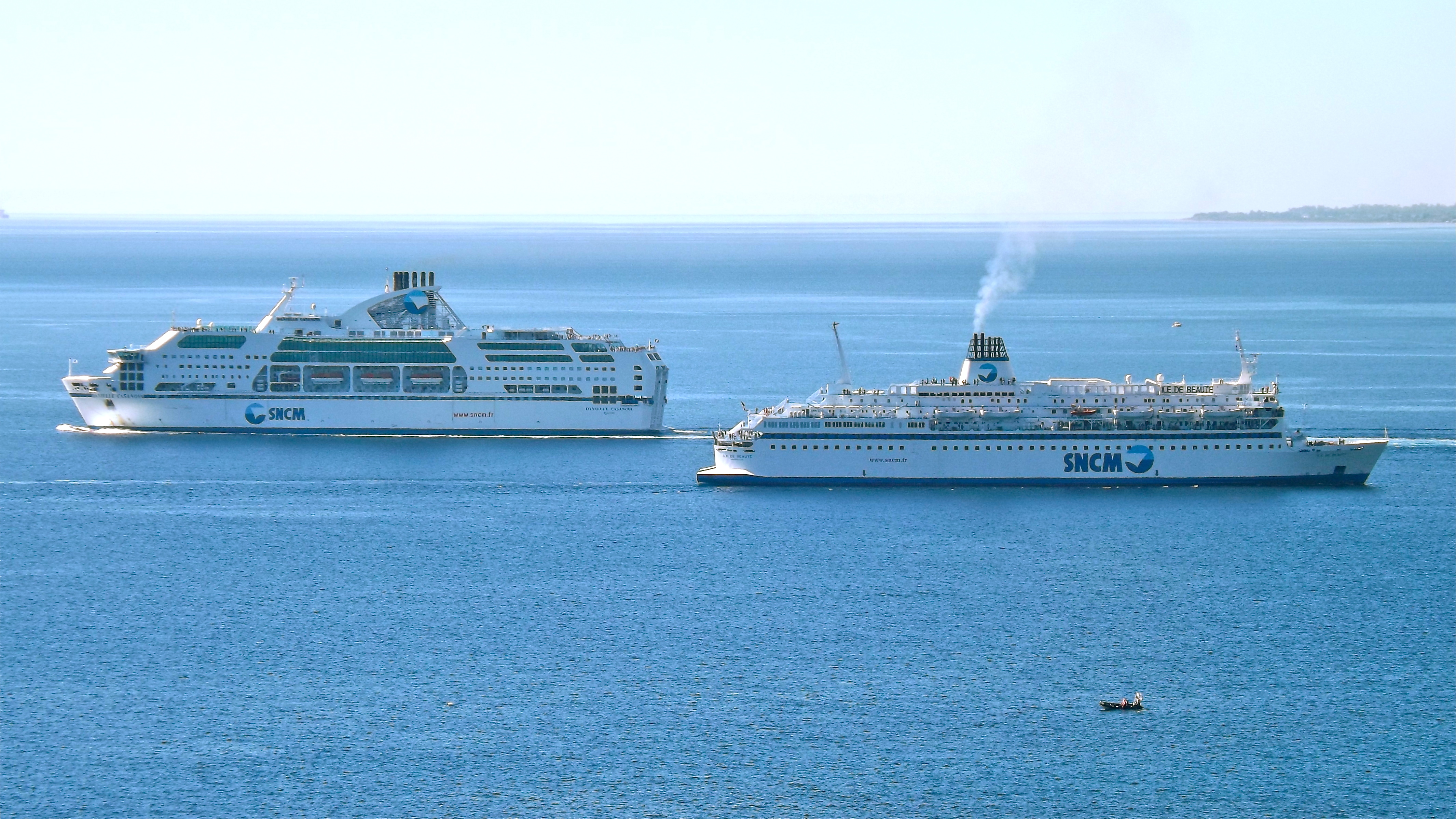 le Danielle Casanova et l'Île de Beauté, SNCM.